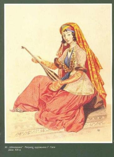 Şamaxılı qız milli geyimdə